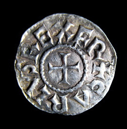 Denar aus dem Fundamentbereich des Aachener Domes (Vorderseite), nach 794